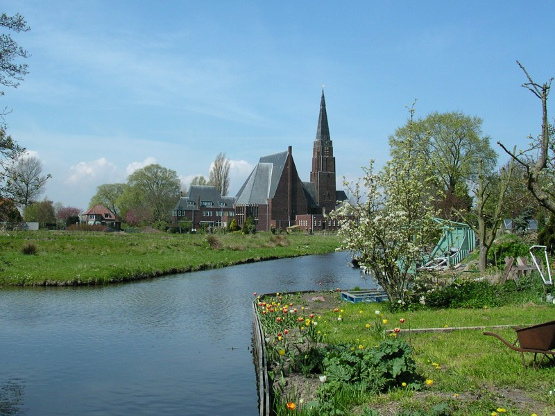 Uitzicht op kerk in Andijk, gemaakt in 2006 View of a church in Andijk, made in 2006